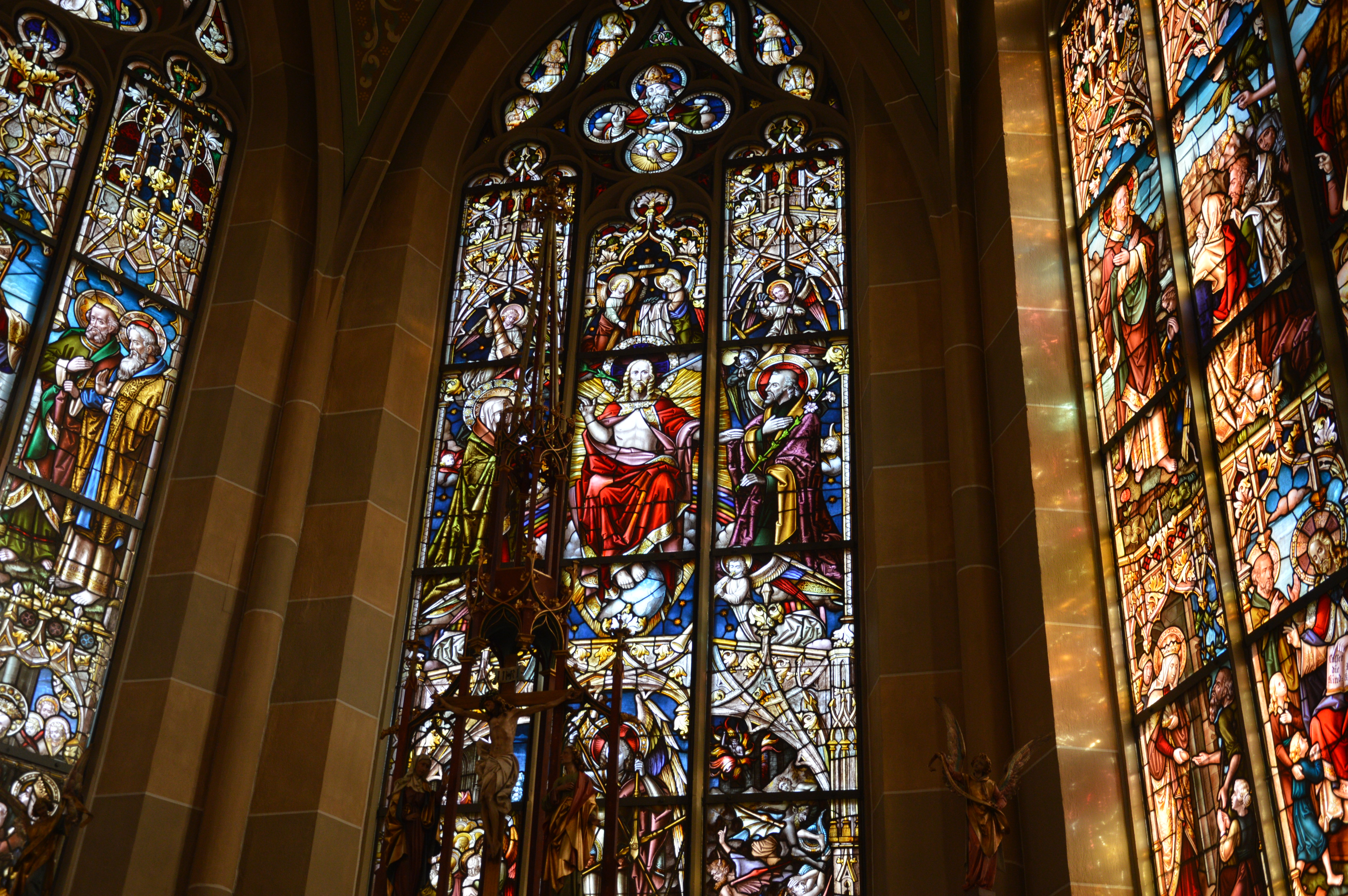 Chorfenster Pfarrkirche St. Matthäus Bad Sobernheim.jpg